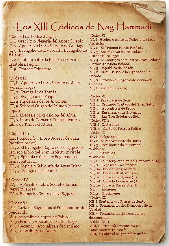 Descripción de los tratados de cada uno de los trece códices de la Biblioteca Copta de Nag Hammadi